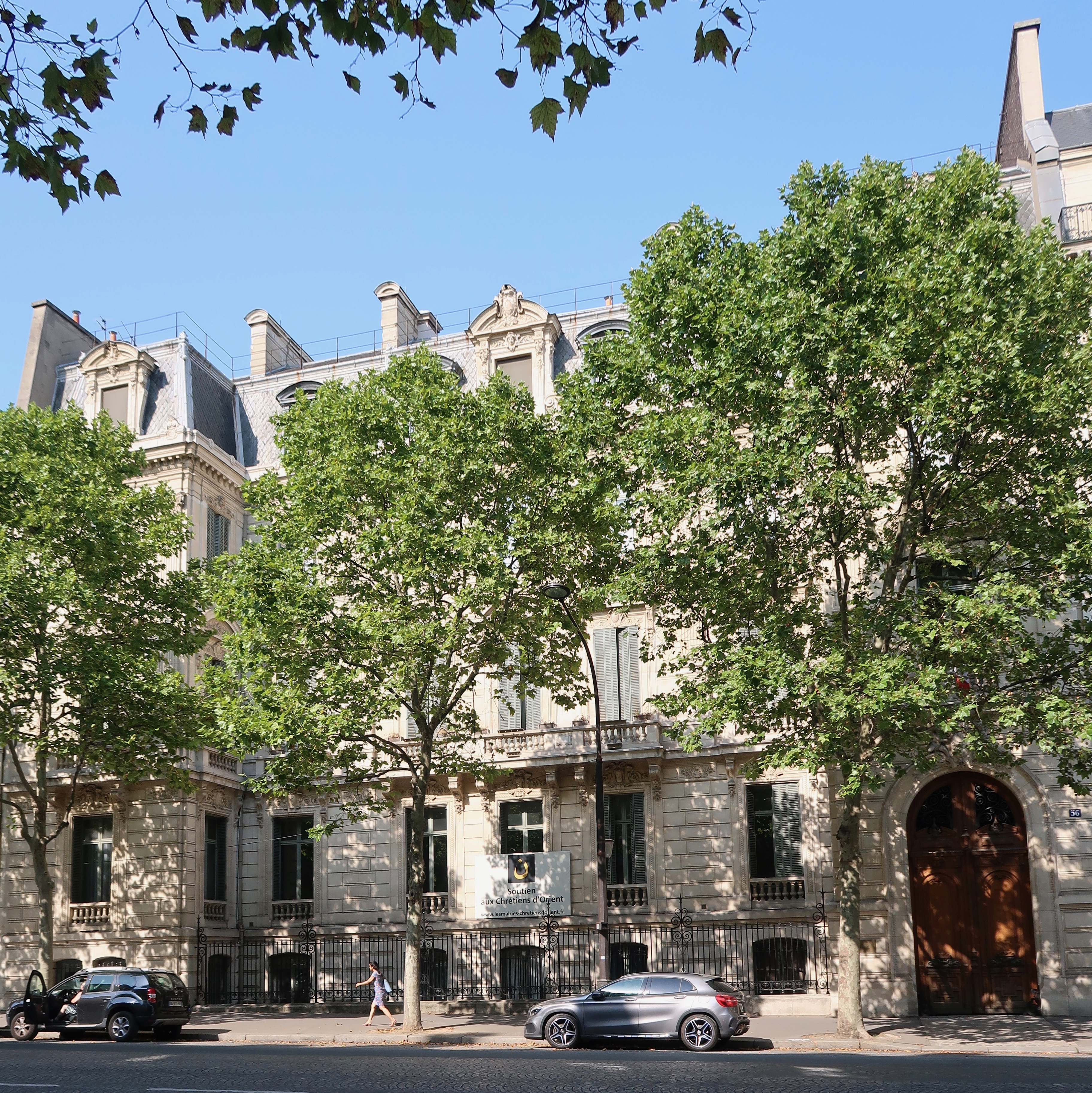 Hôtel Cail, 56 boulevard Malesherbes (Paris, 8e).